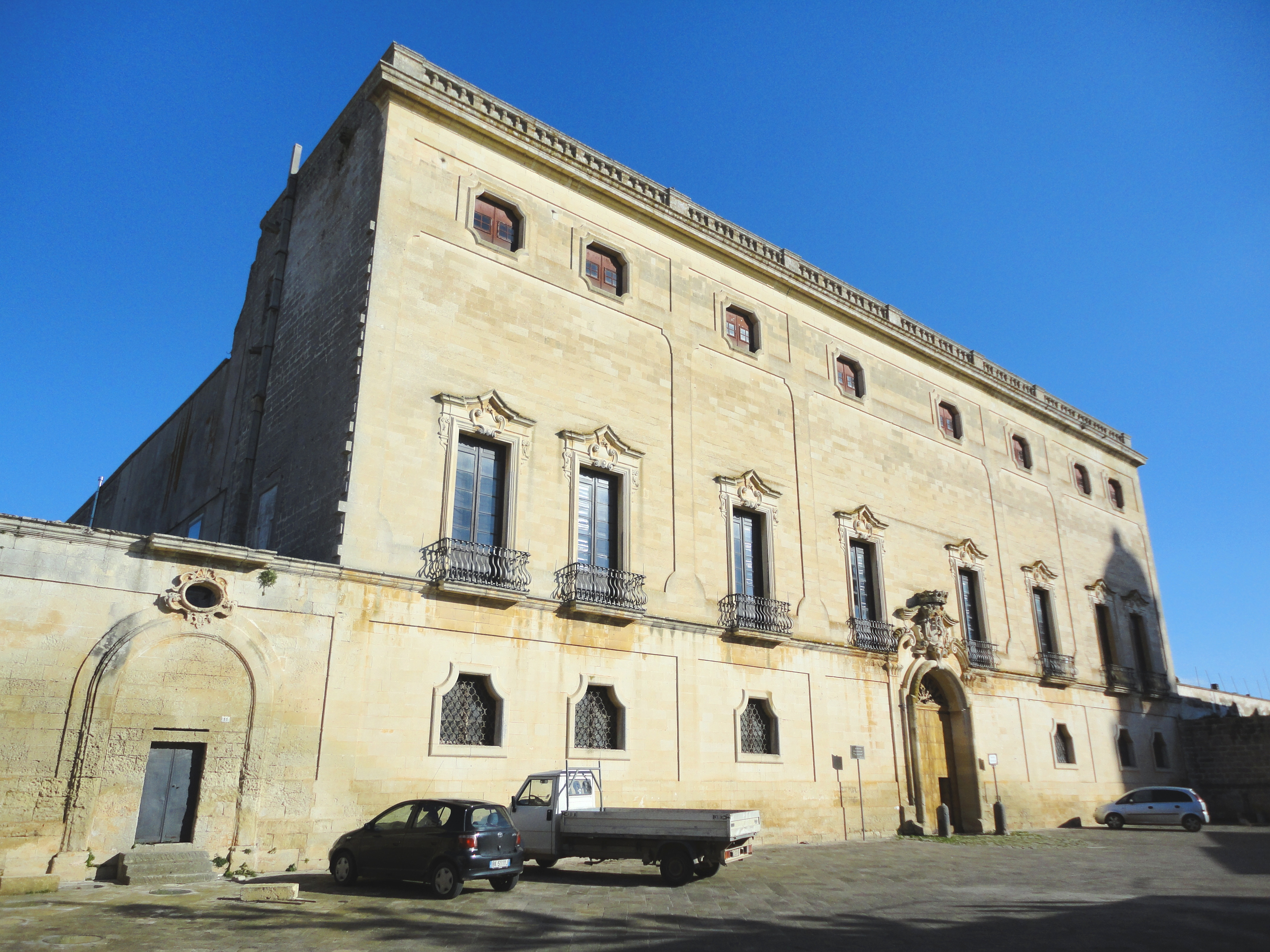 Palazzo Granafei Sternatia, Lecce